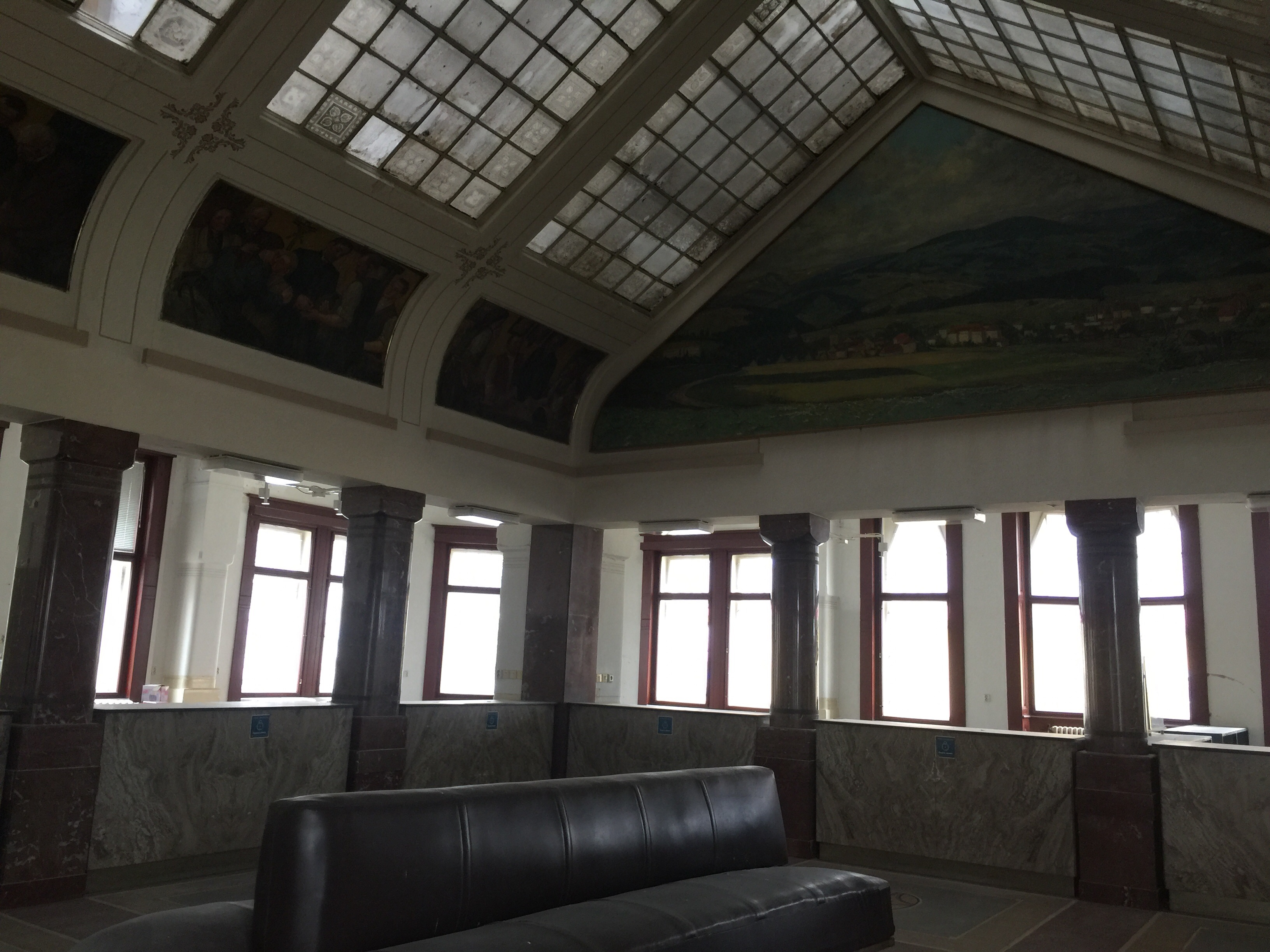 Hlavní sál městské spořitelny